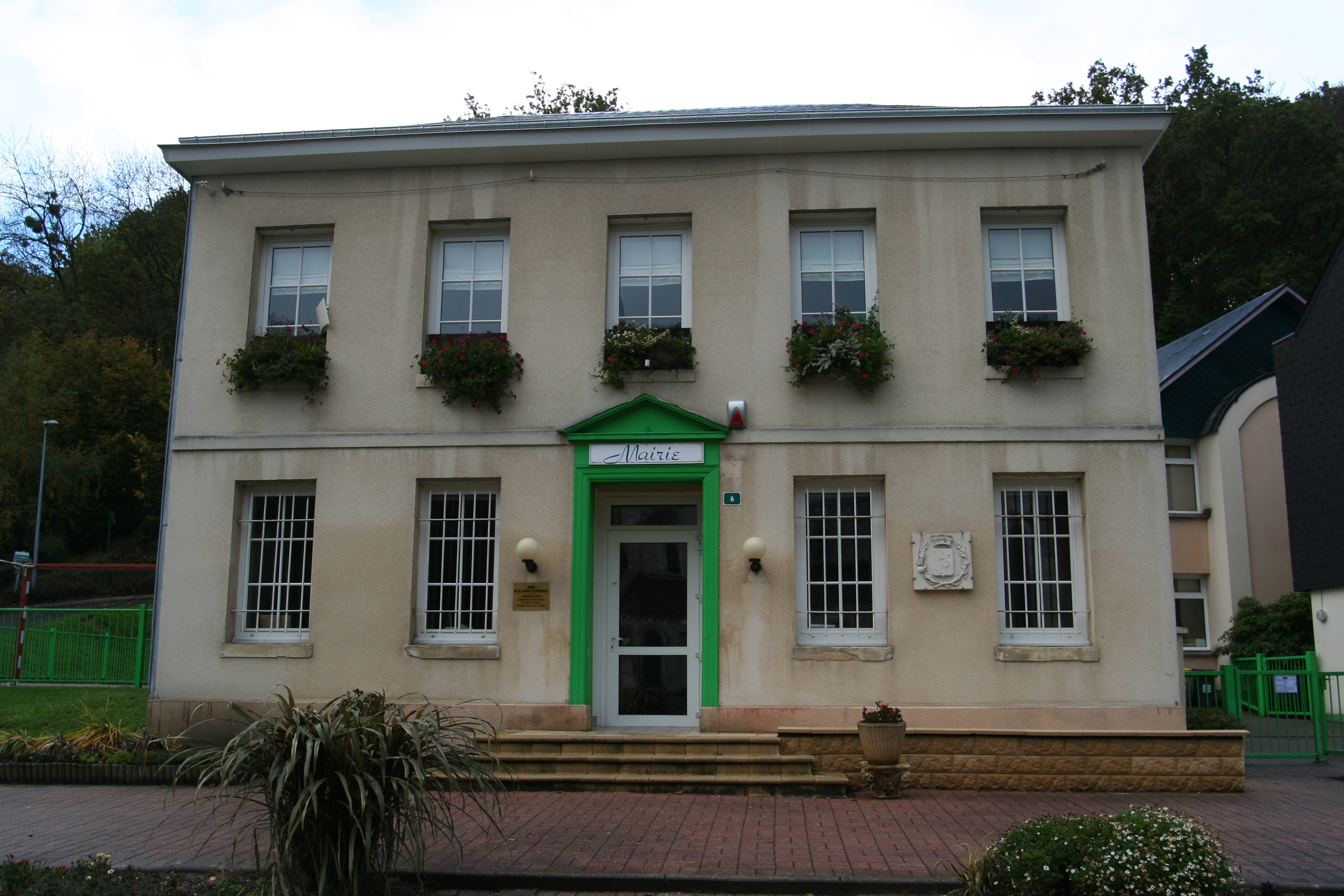 La mairie de Saint-Laurent-de-Brèvedent.